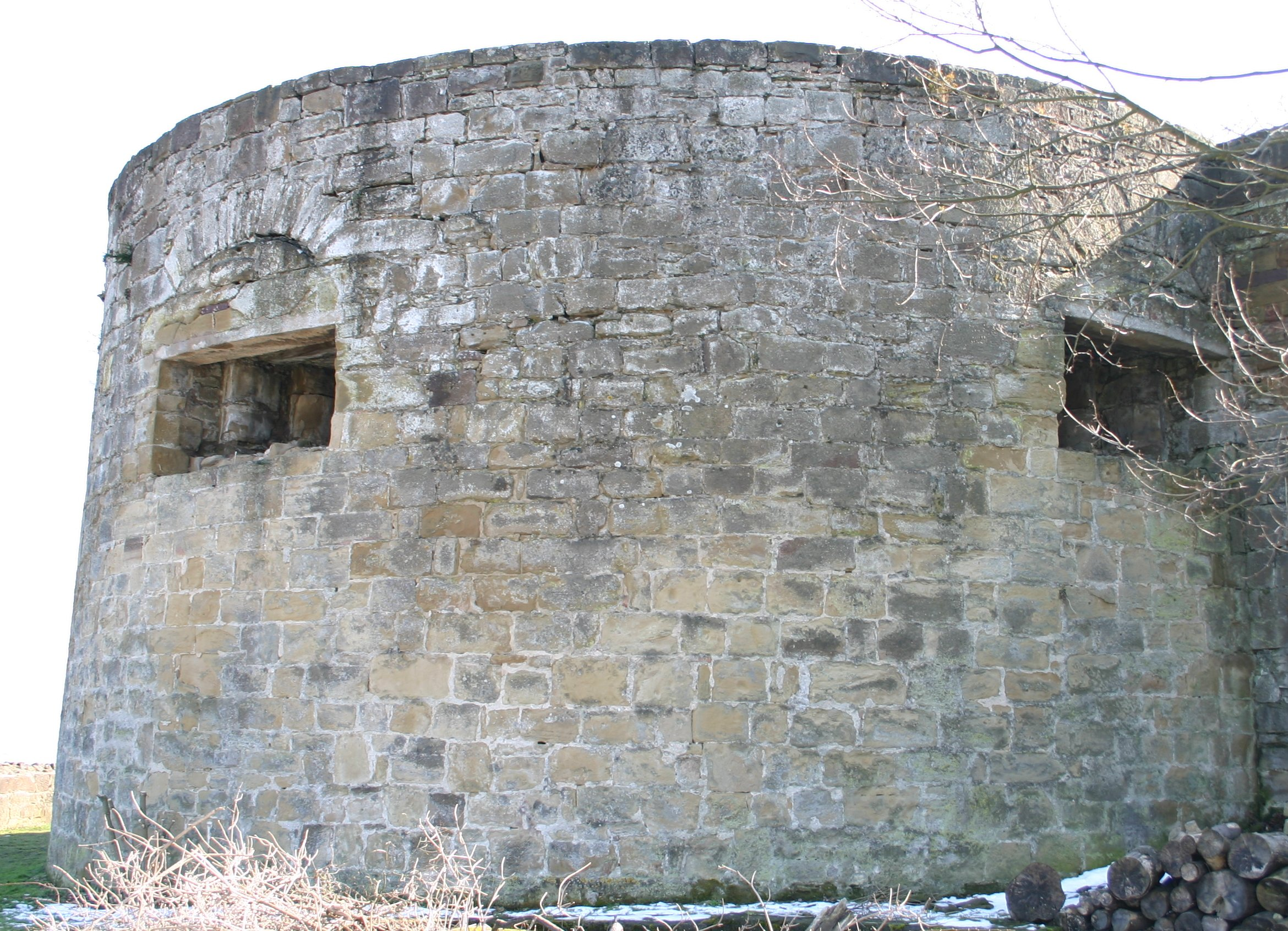 Weinsberg, Burgruine Weibertreu, so genannter Dicker Turm